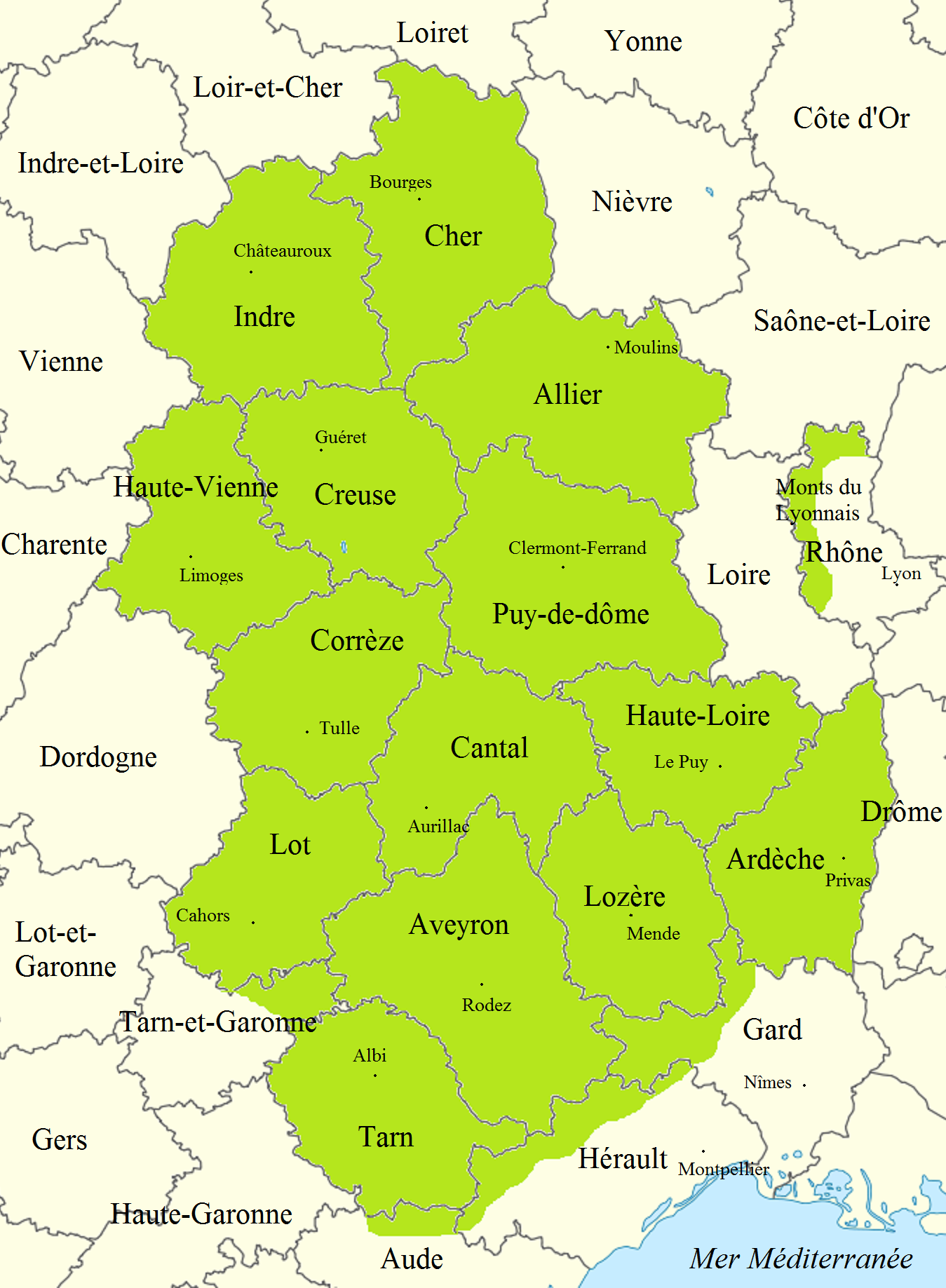 Carte de la circonscription et zone d'intervention de l'ADIMAC (Association pour le Développement Industriel et Economique du Massif central).